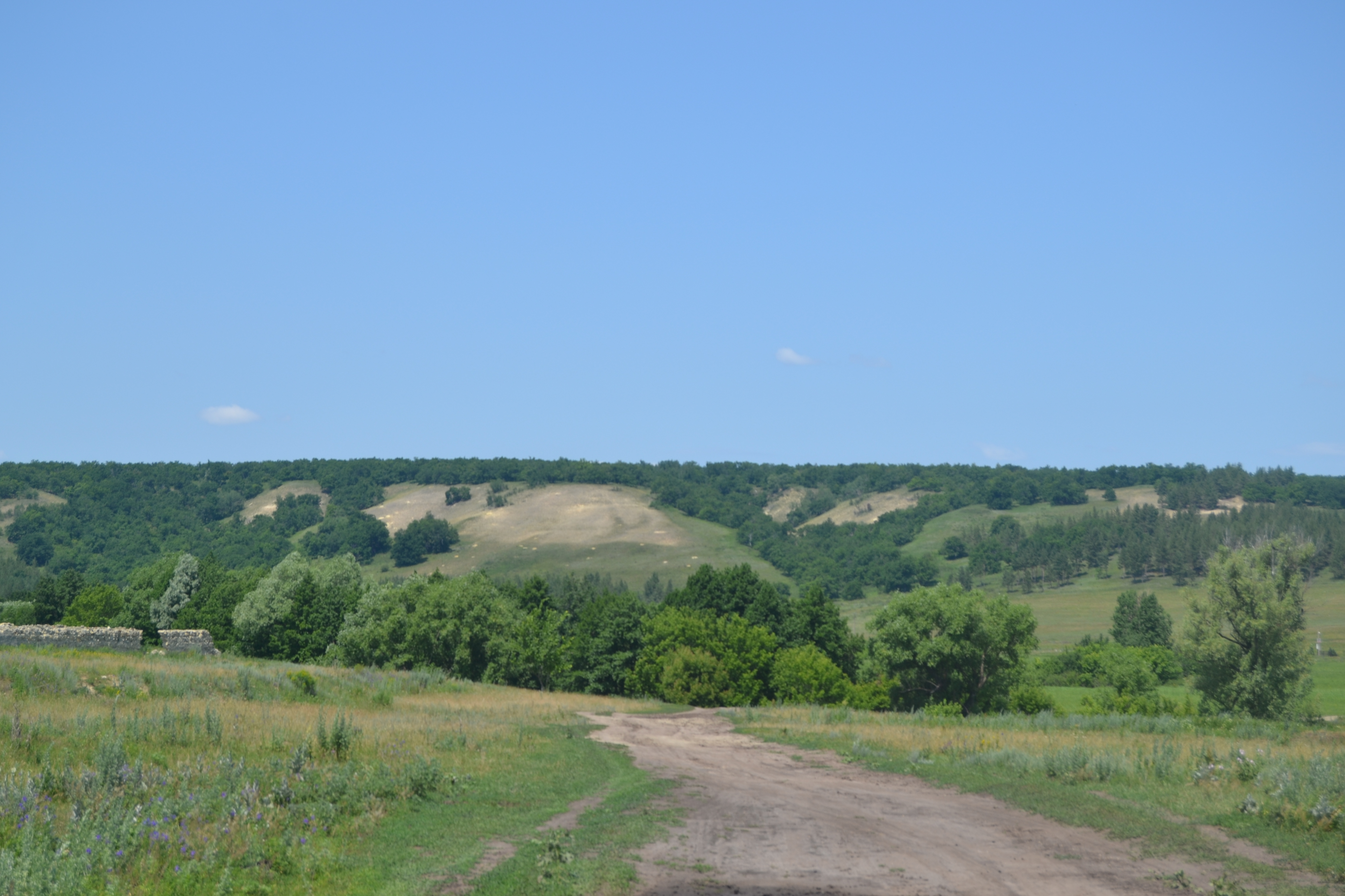 Изображение деревни. Выезд из деревни (Махино, Саратовский район)